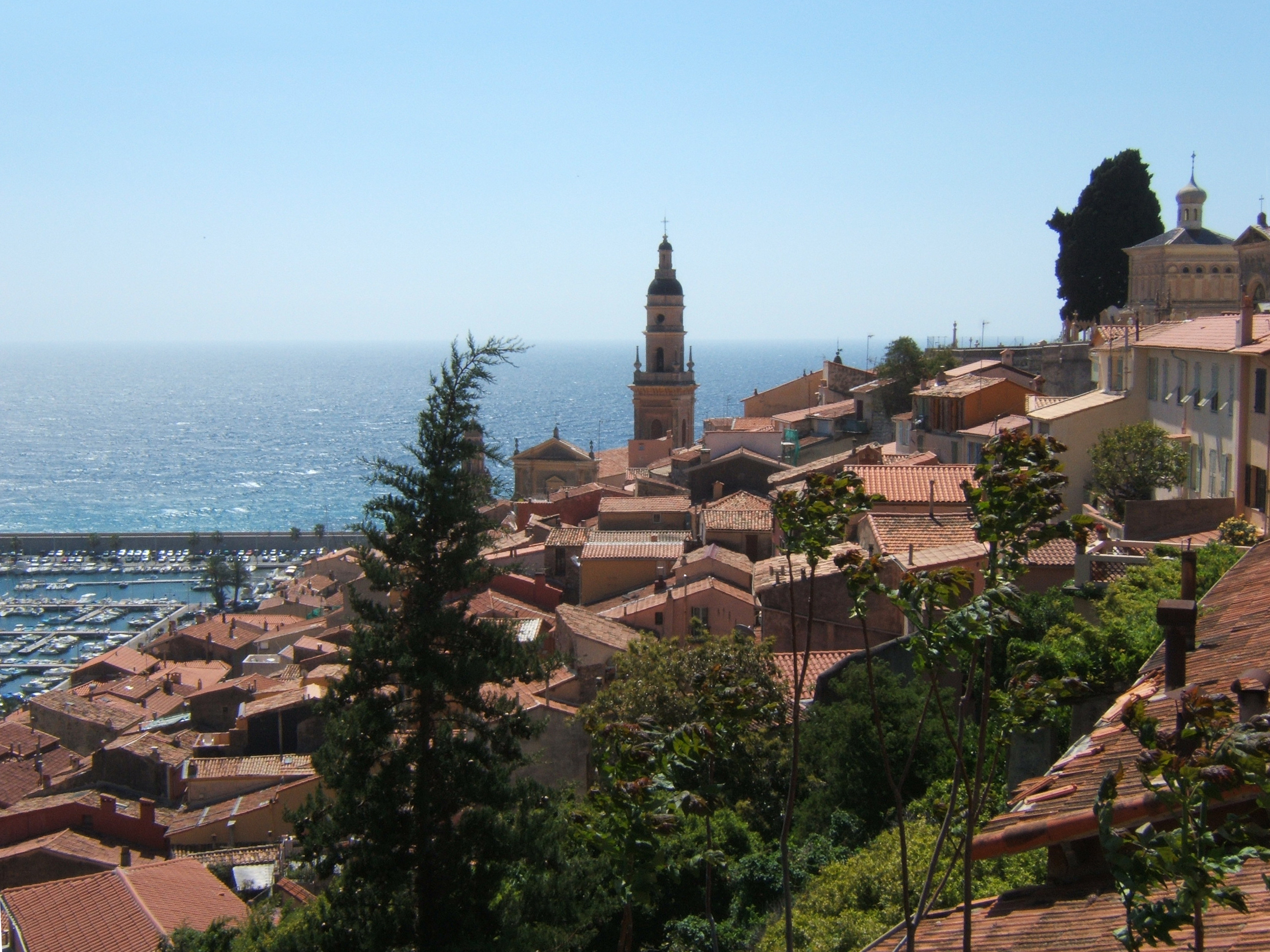 Le vieux Menton avec son enchevêtrement de toitures en tuiles canal.